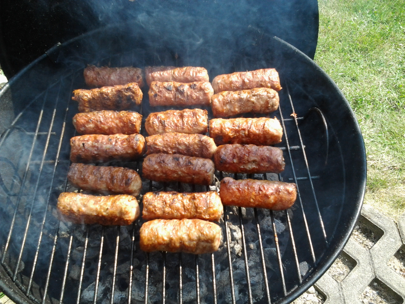 Mititei aufm Kohlegrill (18 Stück; ca. 1 kg rohes Hackfleisch)